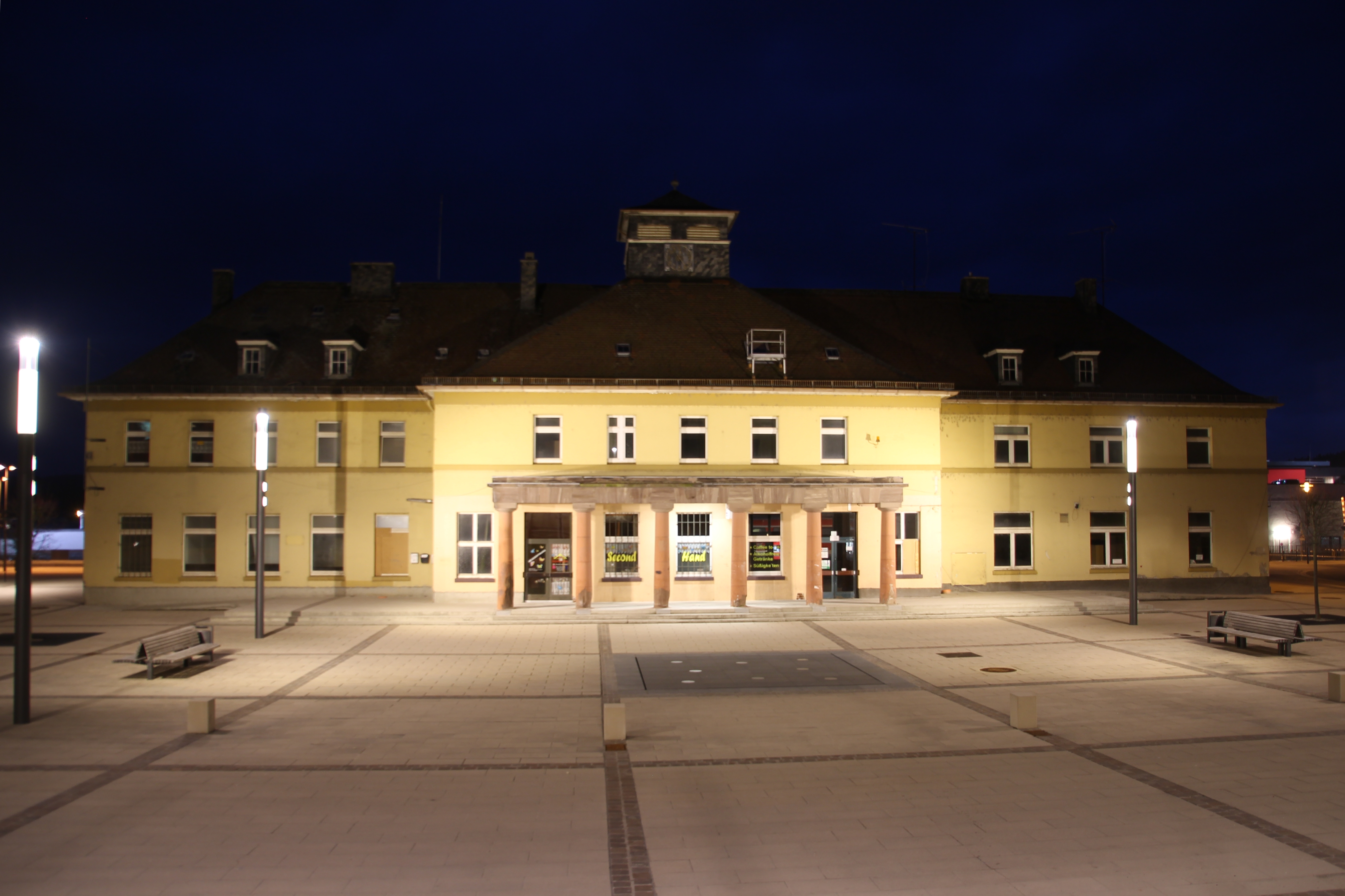 Siehe Bild und Dateiname